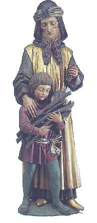 Skulptur von Johann Piger(1848-1932) "Abrahams Opfer: Abraham, in der erhobenen Linken das Messer", Bemaltes Holz Höhe78 cm.